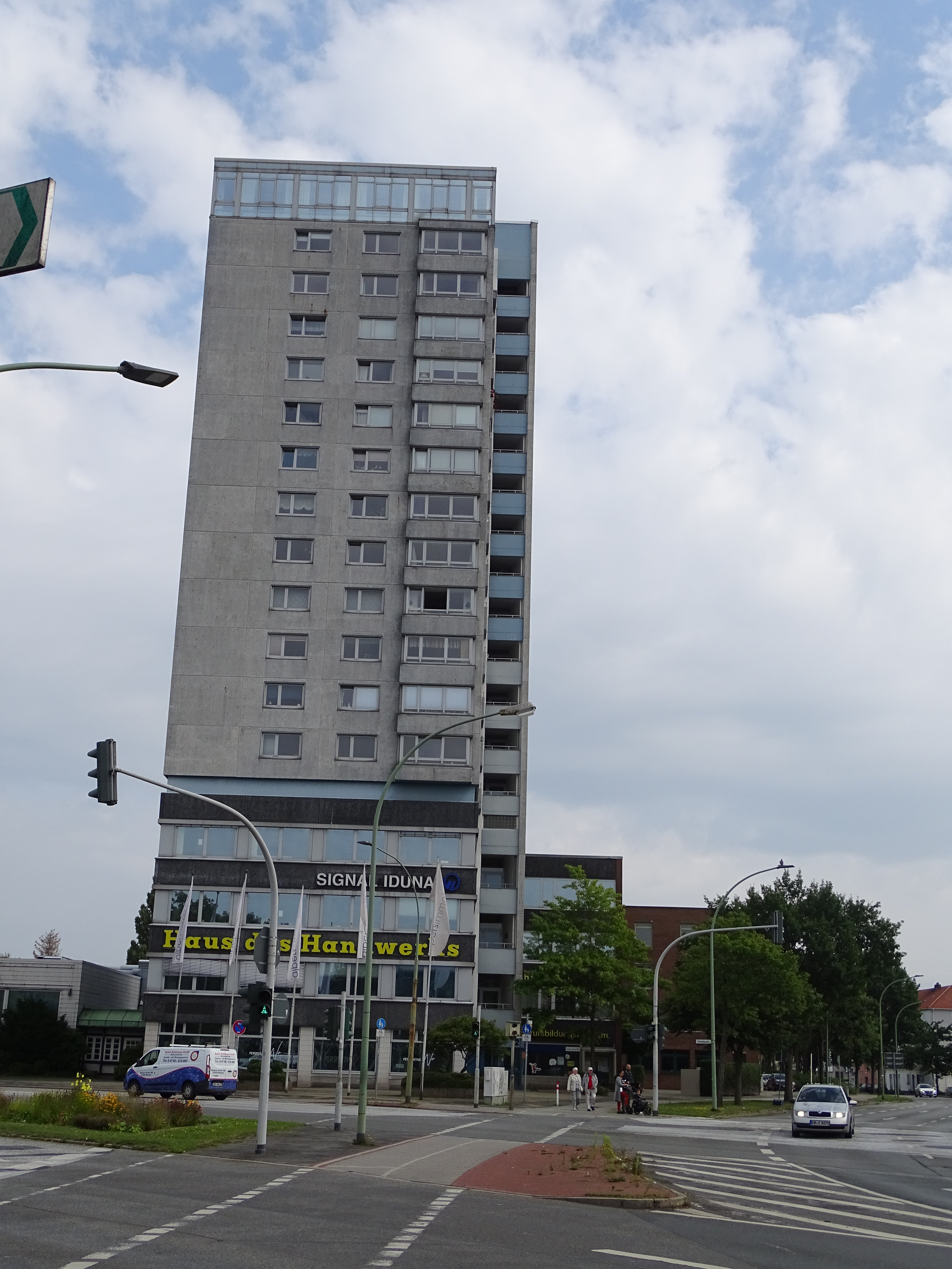 Ehemaliges Haus des Handwerks („Iduna-Hochhaus“) am Elbinger Platz in Bremerhaven-Geestemünde. Kreishandwerksmeister Wilhelm Krohne bemühte sich um eine Gewerbeförderungsanstalt. Am 16. April 1968 wurde der Beschluss gefasst, die Förderanstalt in Form eines 16-stöckigen Hochhauses zu errichten. Das Richtfest fand am 30. Oktober 1970 statt, die Einweihung im September 1972. Der Baustil lässt die Neue Heimat erkennen.